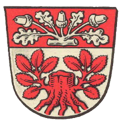 Wappen von Buchschlag, Stadtteil von Dreieich